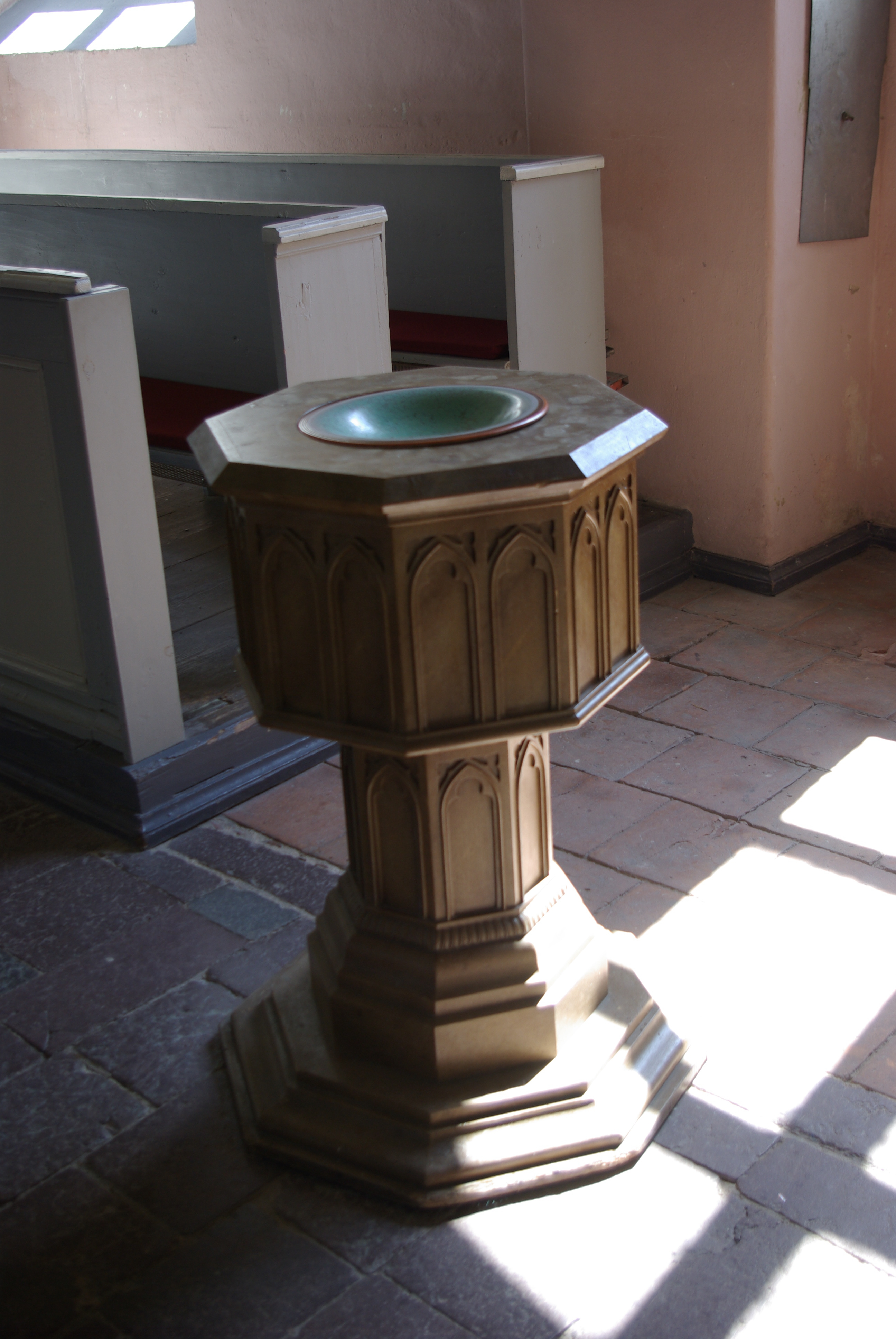 Bad Freienwalde in Brandenburg. Im Ortsteil Altranft steht die Dorfkirche. Die Kirche ist Teil des Freilichtmuseums. Die Kirche steht unter Denkmalschutz.